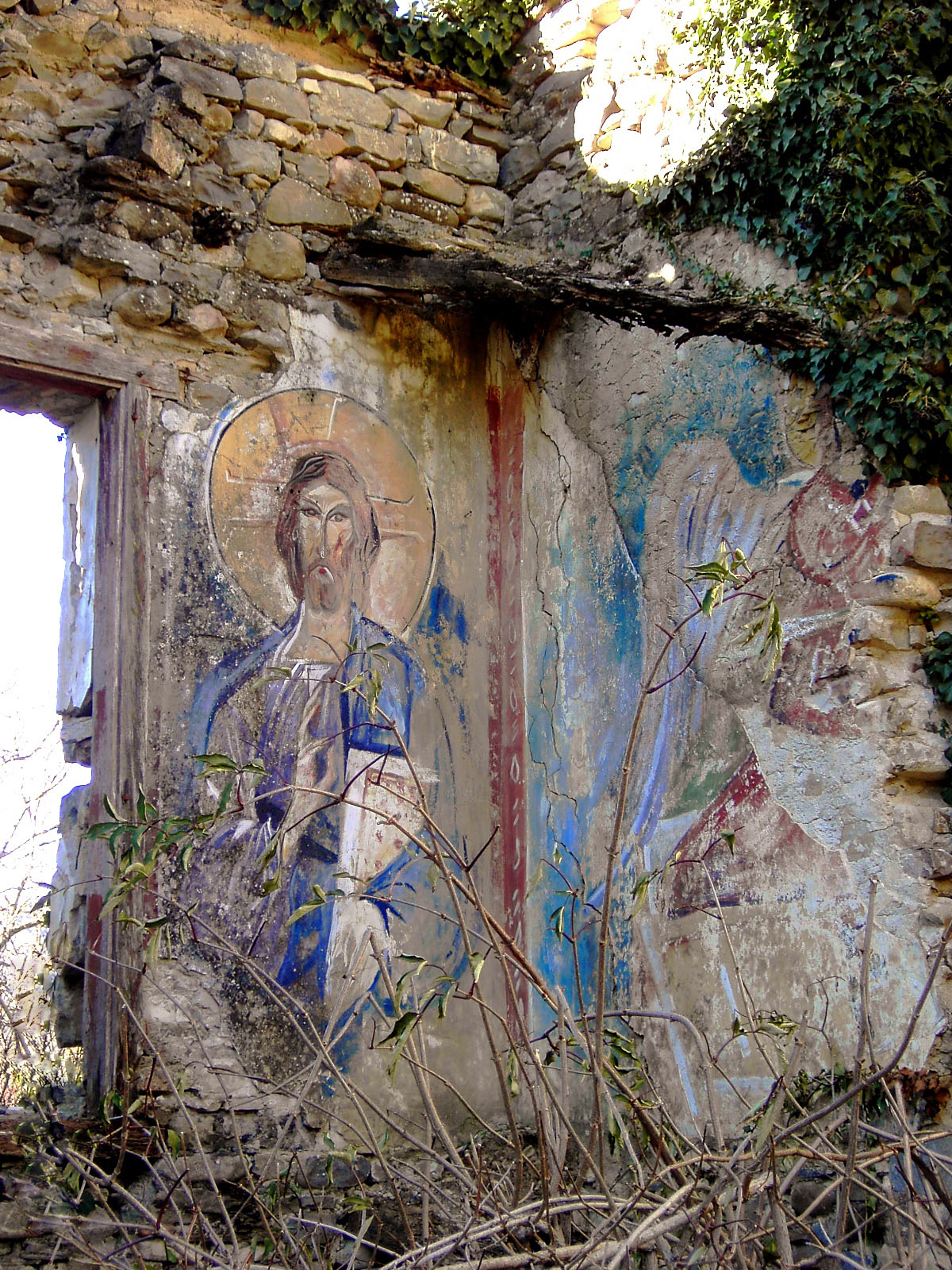 Pinturas murales cercanas a la iglesia de Jánovas, que quedaron al descubierto al venirse abajo el edificio que las cobijaba.